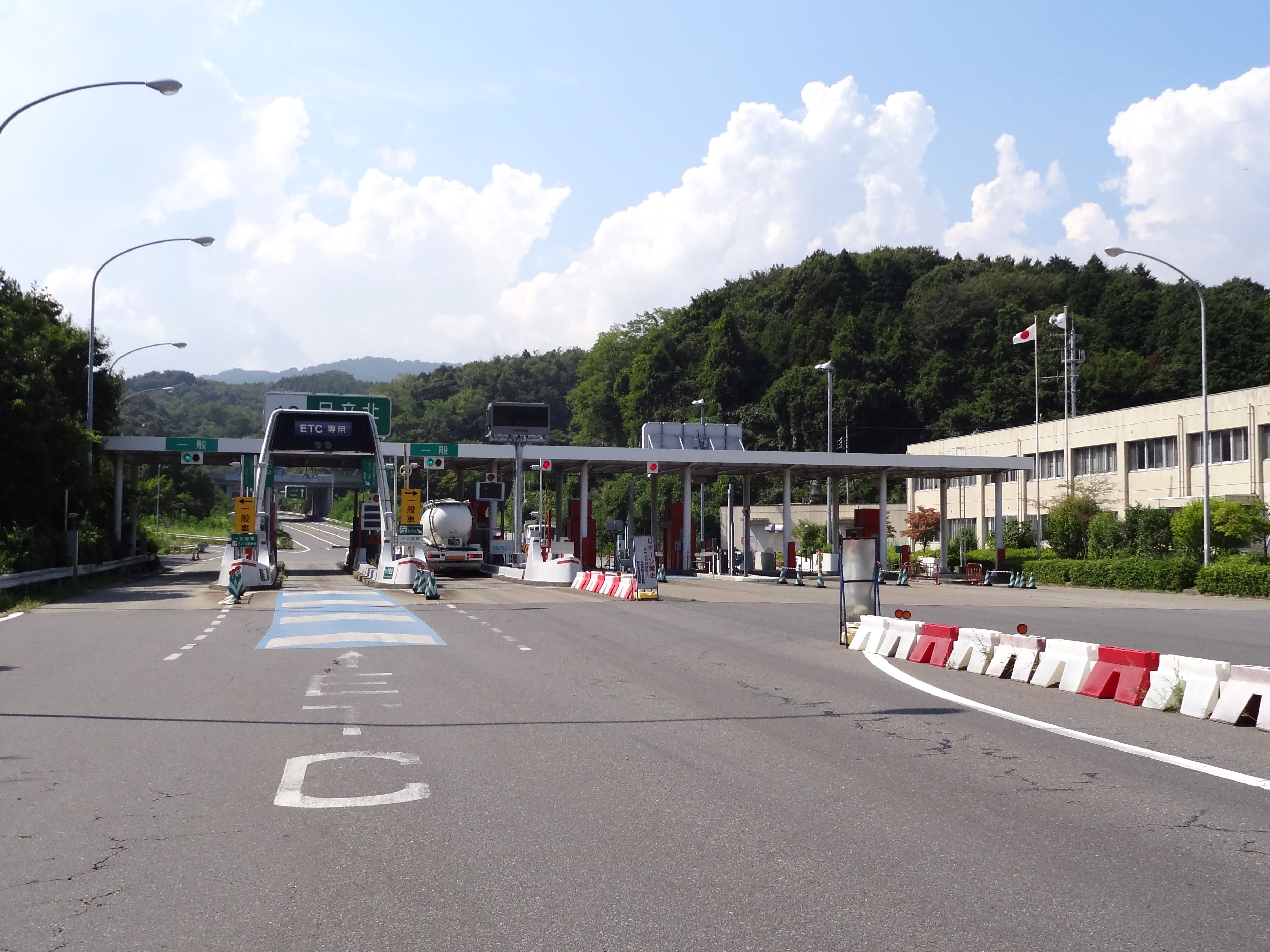 常磐自動車道 日立北インターチェンジ